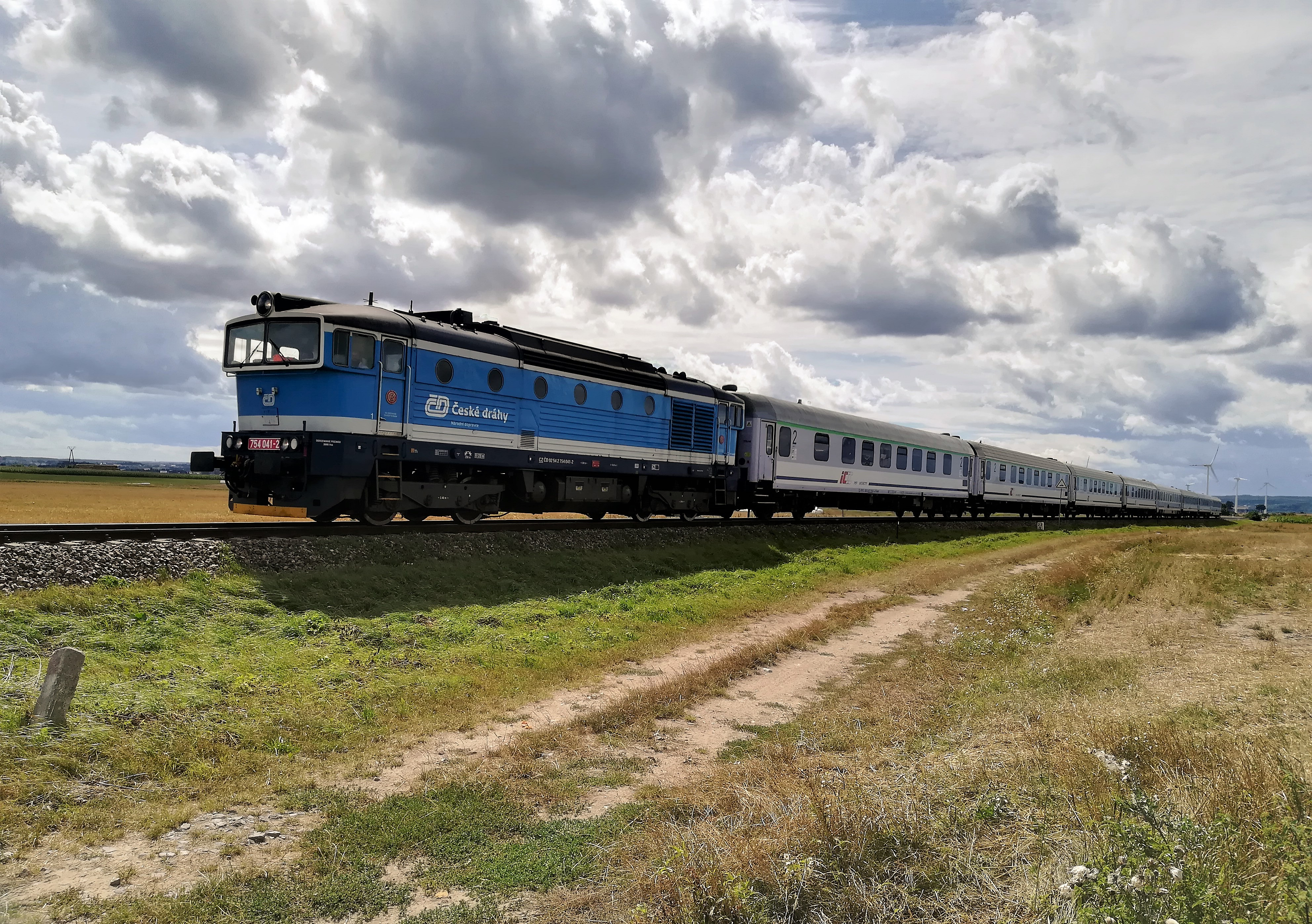 754-041-2 koło Swarzewa z pociągiem Bohumin - Hel.